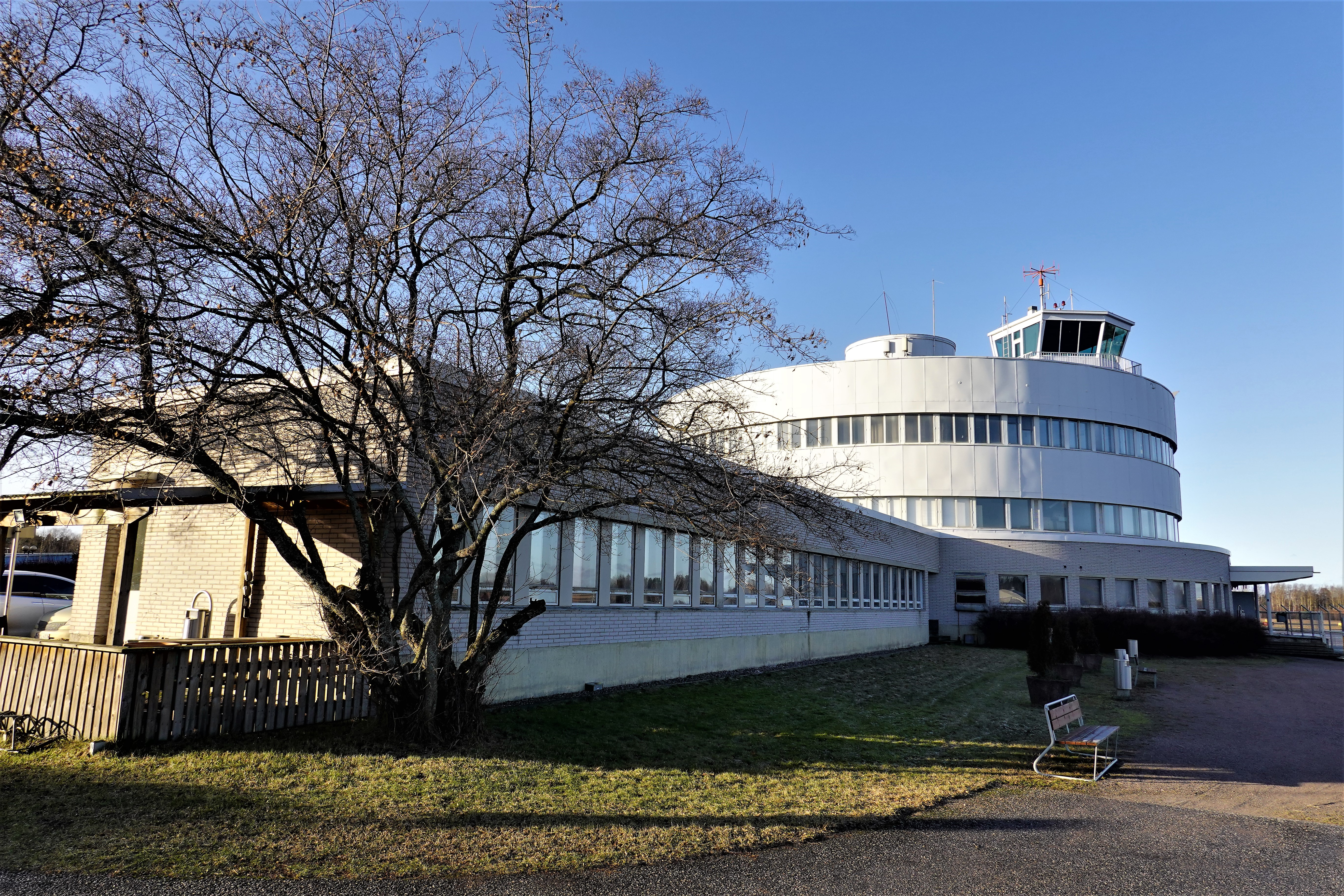 puu, rakennuksen siipi ja päärakennus